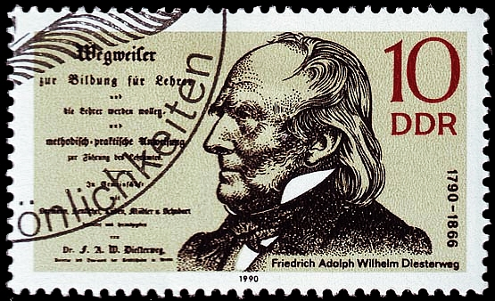 Friedrich Adolph Wilhelm Diesterweg (1790–1866), pédagogue allemand